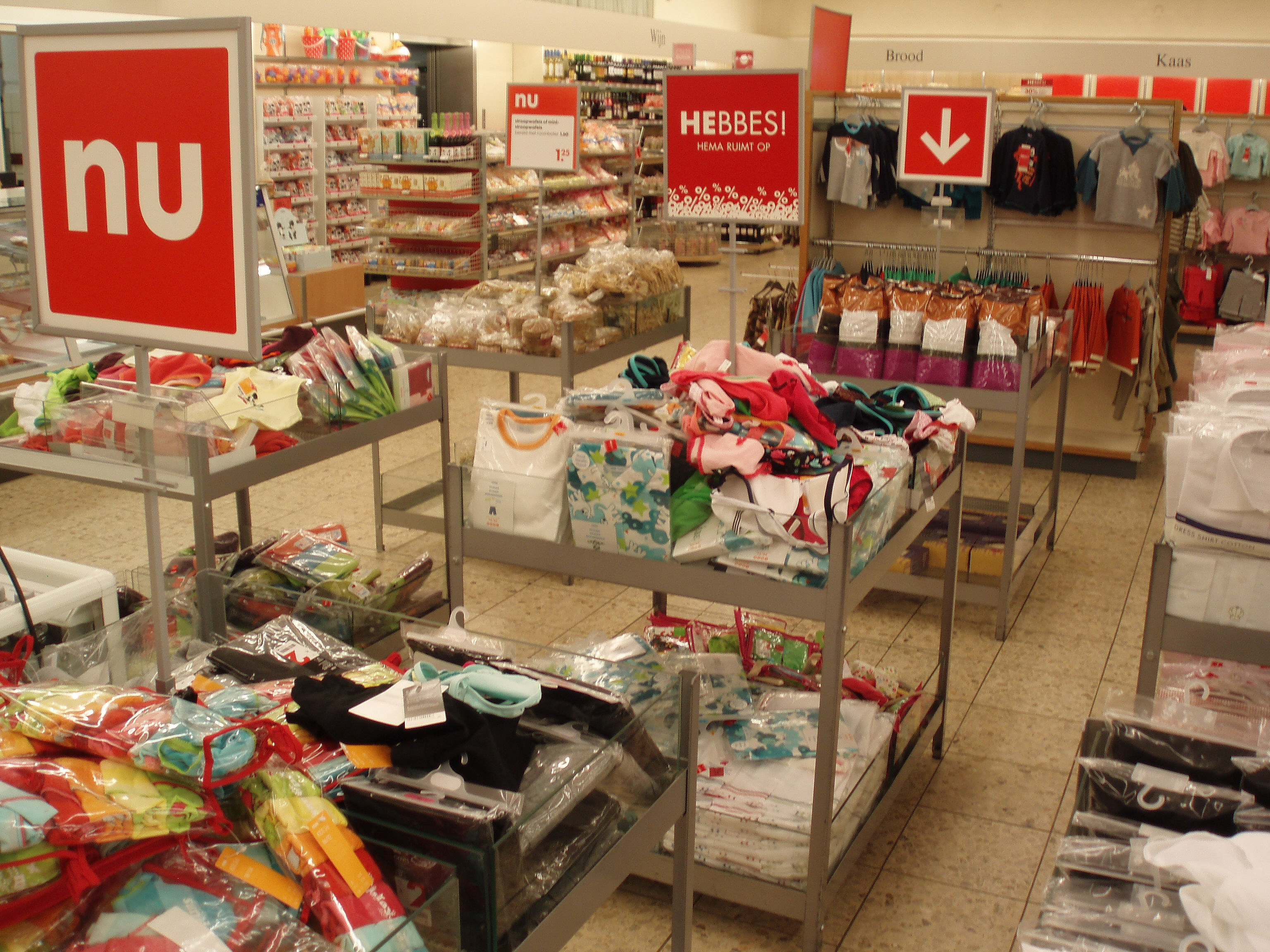 Interieur van het HEMA-filiaal aan de Diezerstraat in Zwolle.